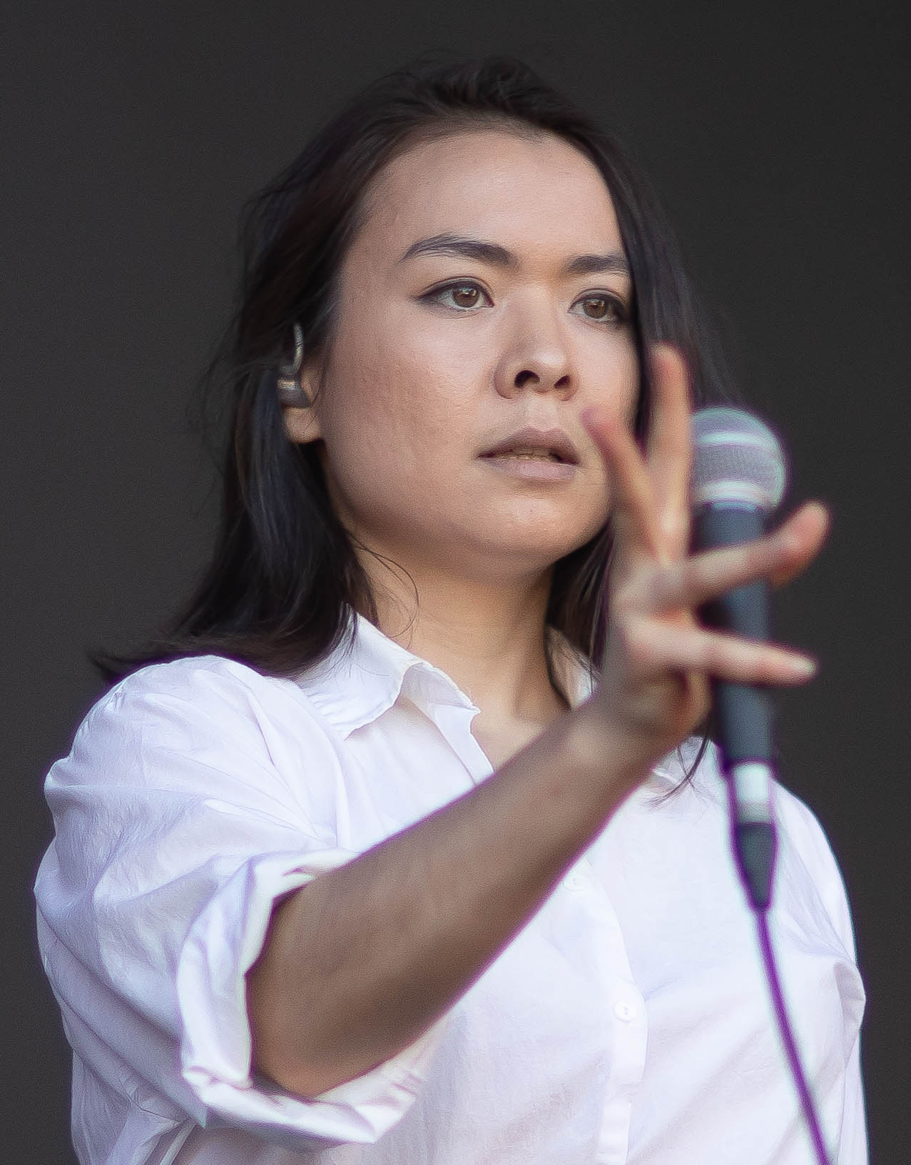 Mitksi